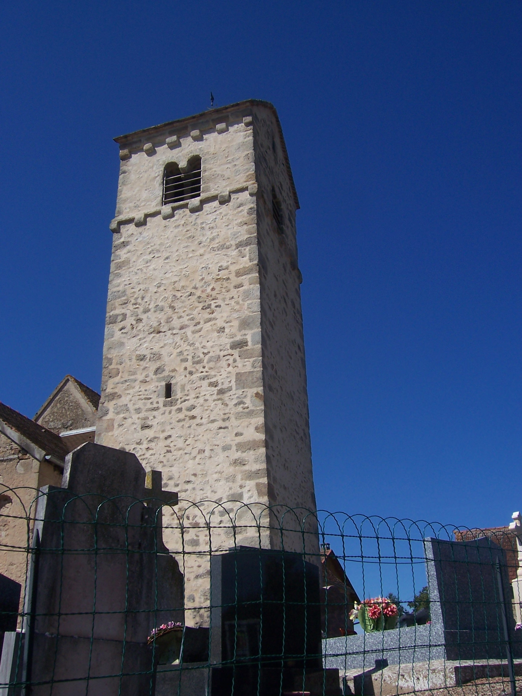 Eglise de Collonge-la-Madeleine